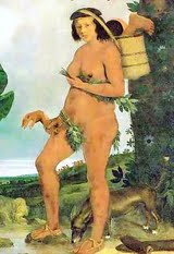 Mulher tupinambá